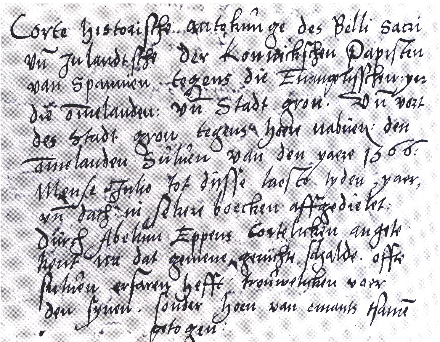 Fragment opschrift derde deel van de Kroniek van Abel Eppens